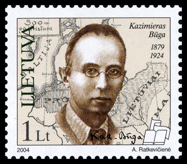 Казімір Буга